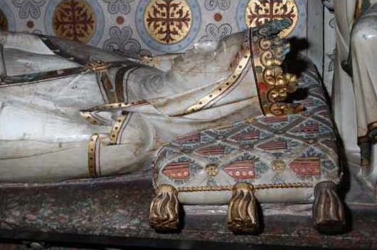 Tomba de la reina Elisenda de Montcada (monestir de Pedralbes, Barcelona), detall